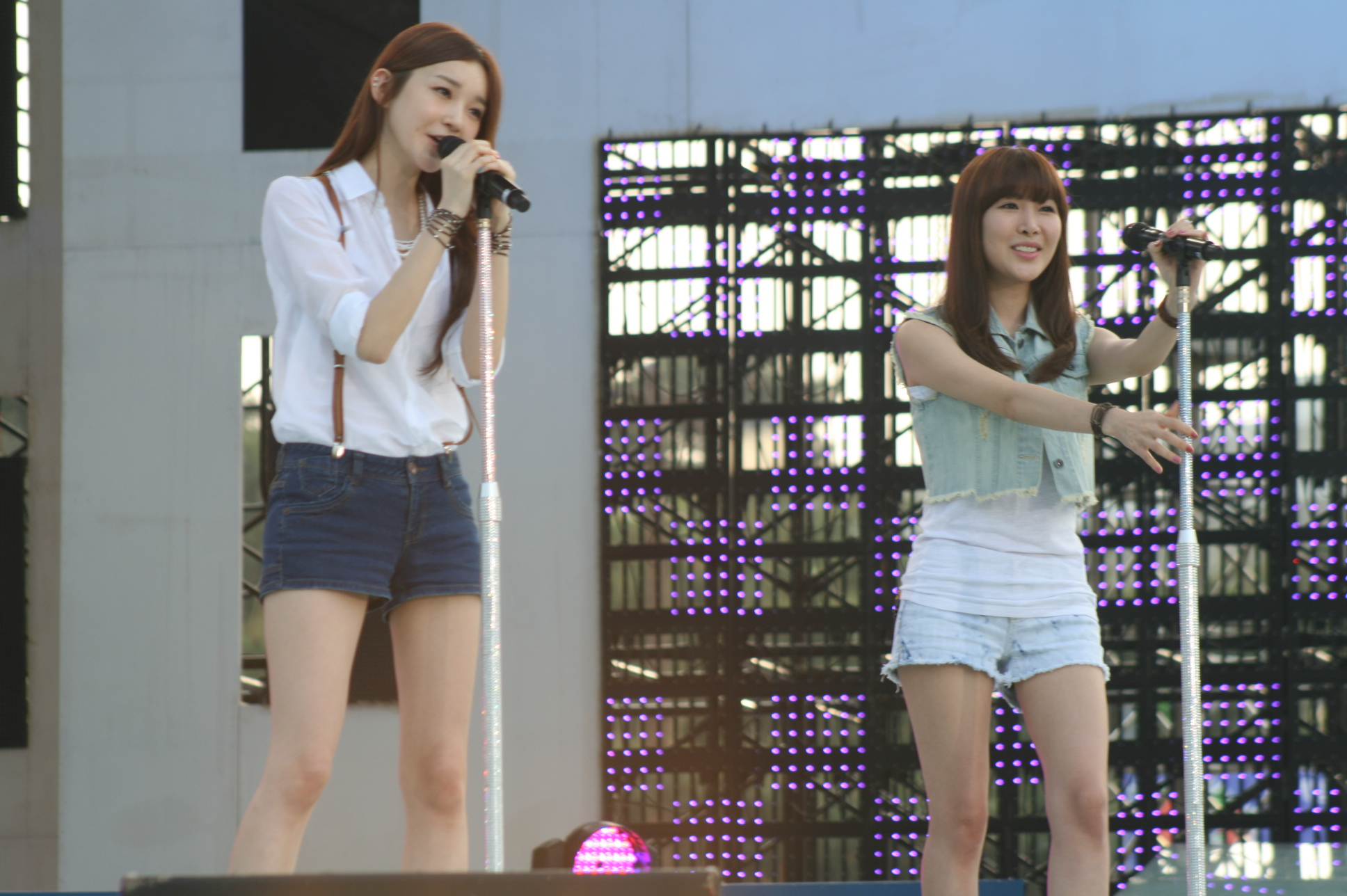 대한민국의 여성 듀오 다비치